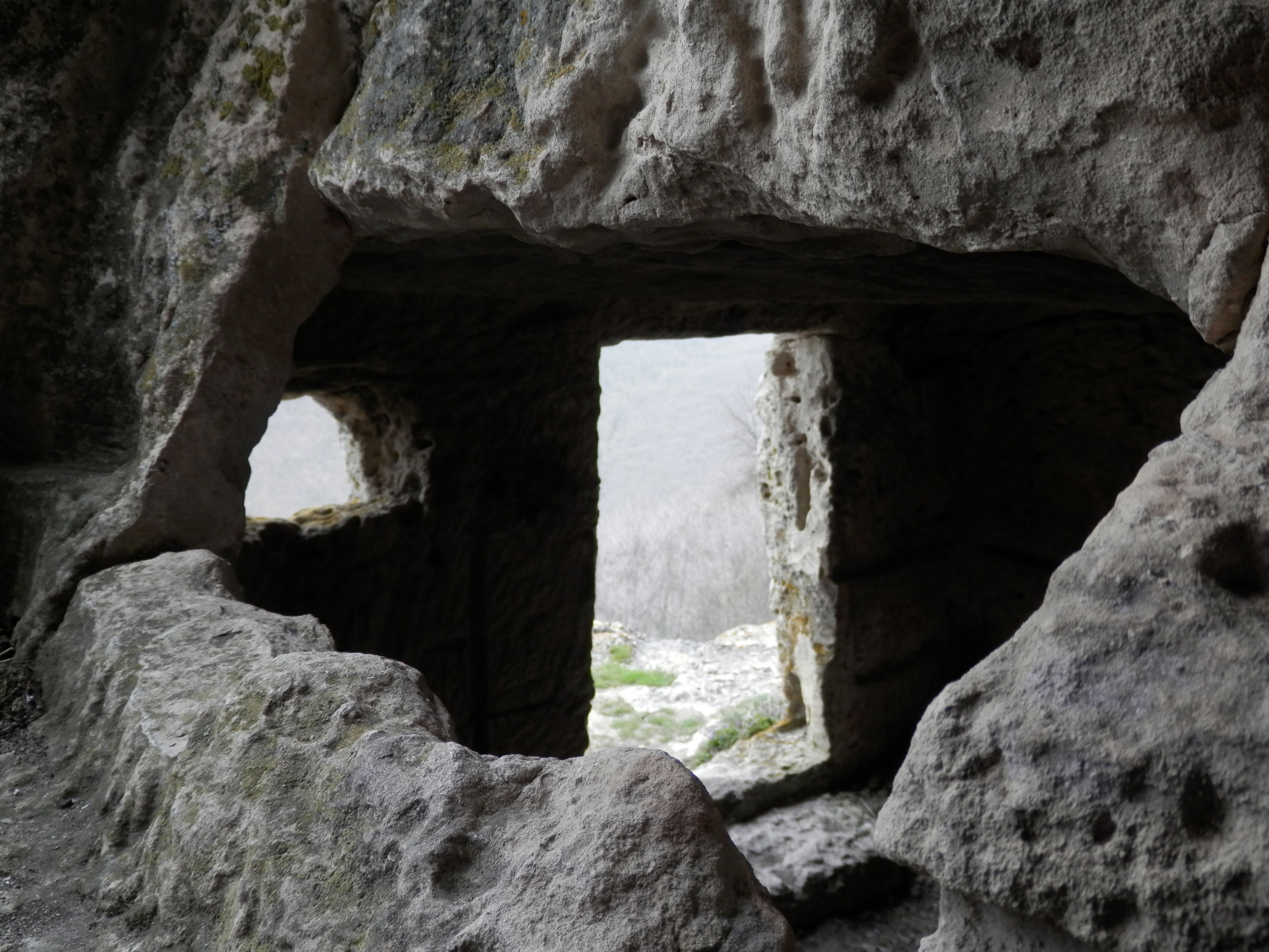 печера